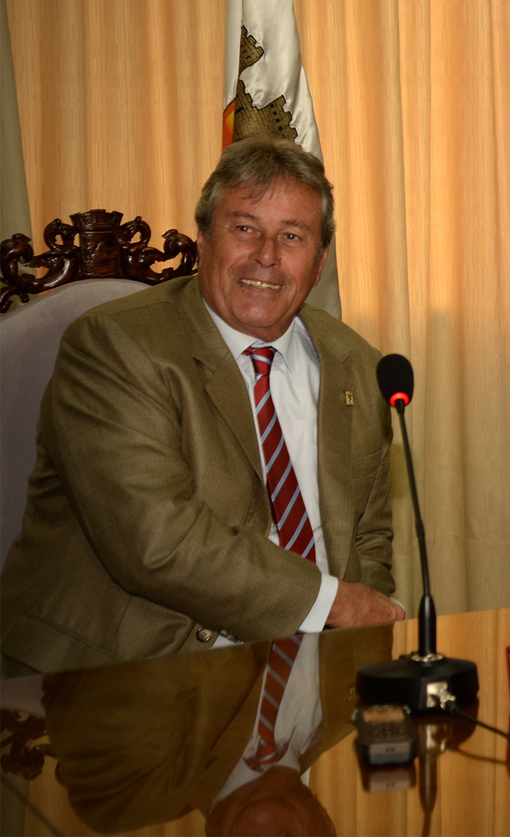 La Embajadora de los Estados Unidos, Kelly Keiderling, visitó el departamento de Maldonado. En su primera jornada en dicho departamento fue recibida por el Intendente Enrique Antía y el Secretario General Diego Echeverría, junto a quienes brindó una conferencia de prensa. Luego visitó el Liceo 4 y la Alianza, donde directores, profesores y alumnos le brindaron una muy cálida bienvenida. Para finalizar la primera jornada, la Embajadora compartió un té con representantes del gobierno y de la sociedad civil para conversar sobre temas de género y trata de personas en el Uruguay. [U.S. Embassy photo: Gonzalo García / Copyright info]